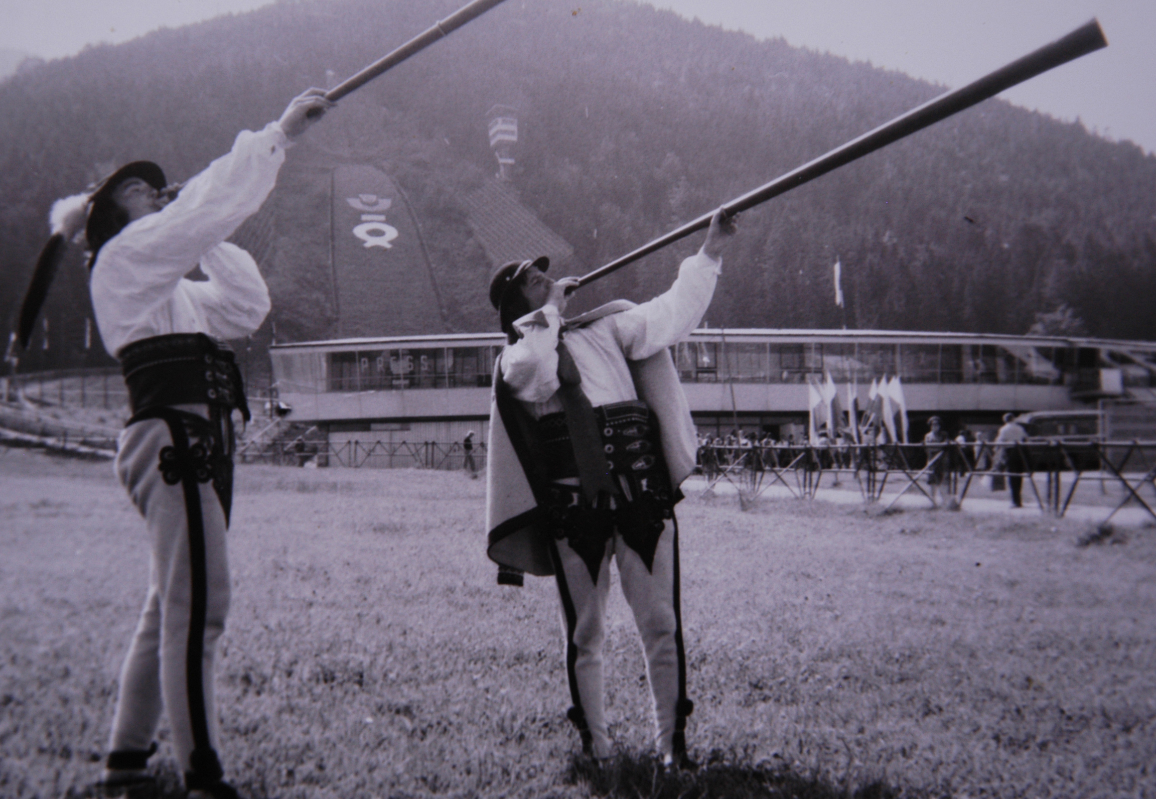 gra na trombitach.